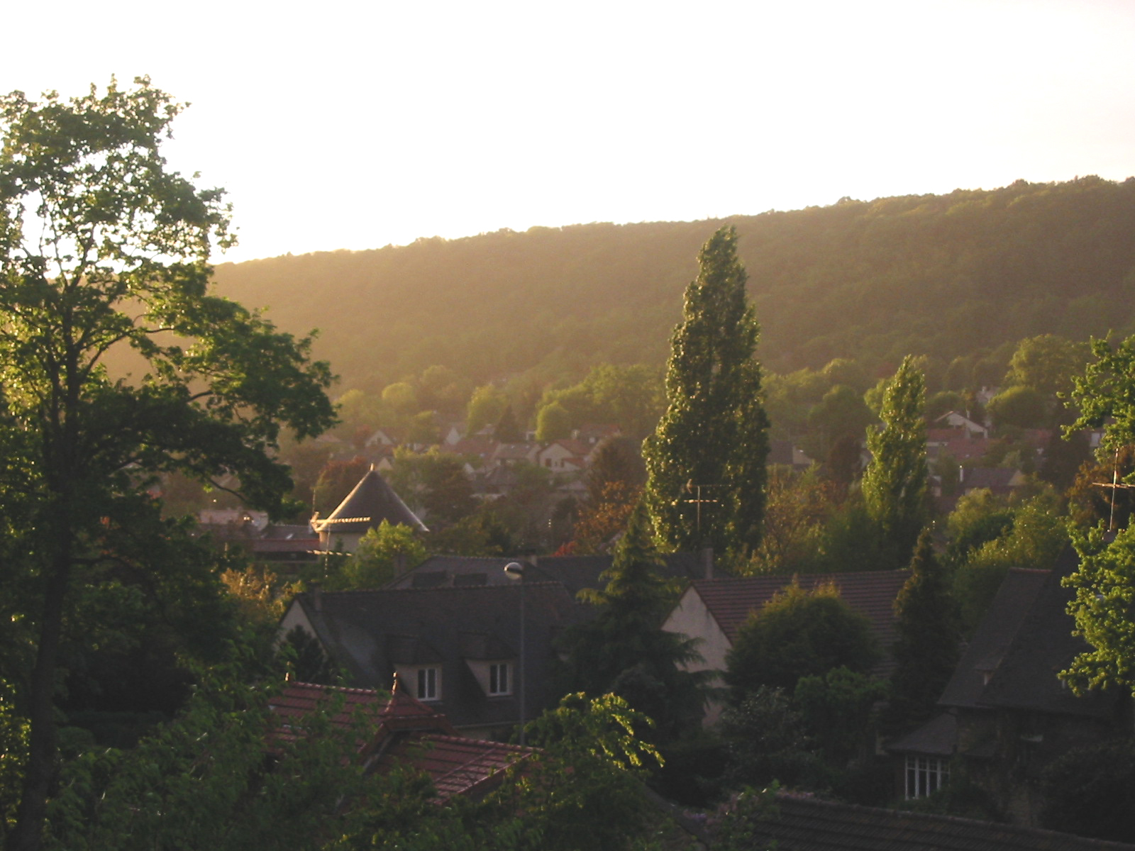 Bures-sur-Yvette, coucher de soleil